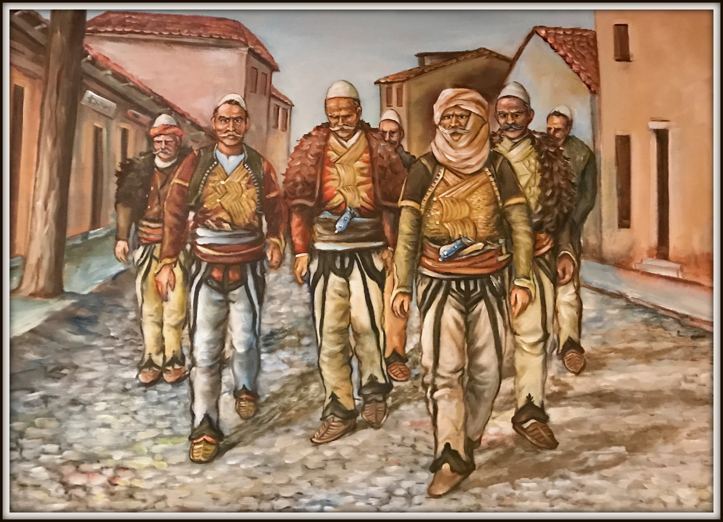 Shtatë Shaljant (Piktur në vaj).